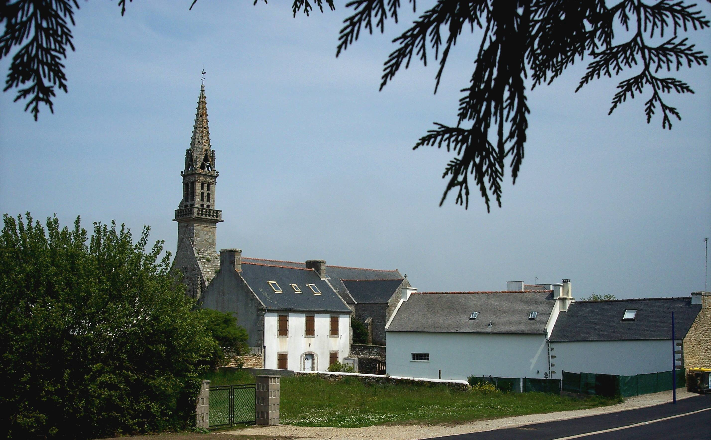 le bourg de Plogoff, Finistère